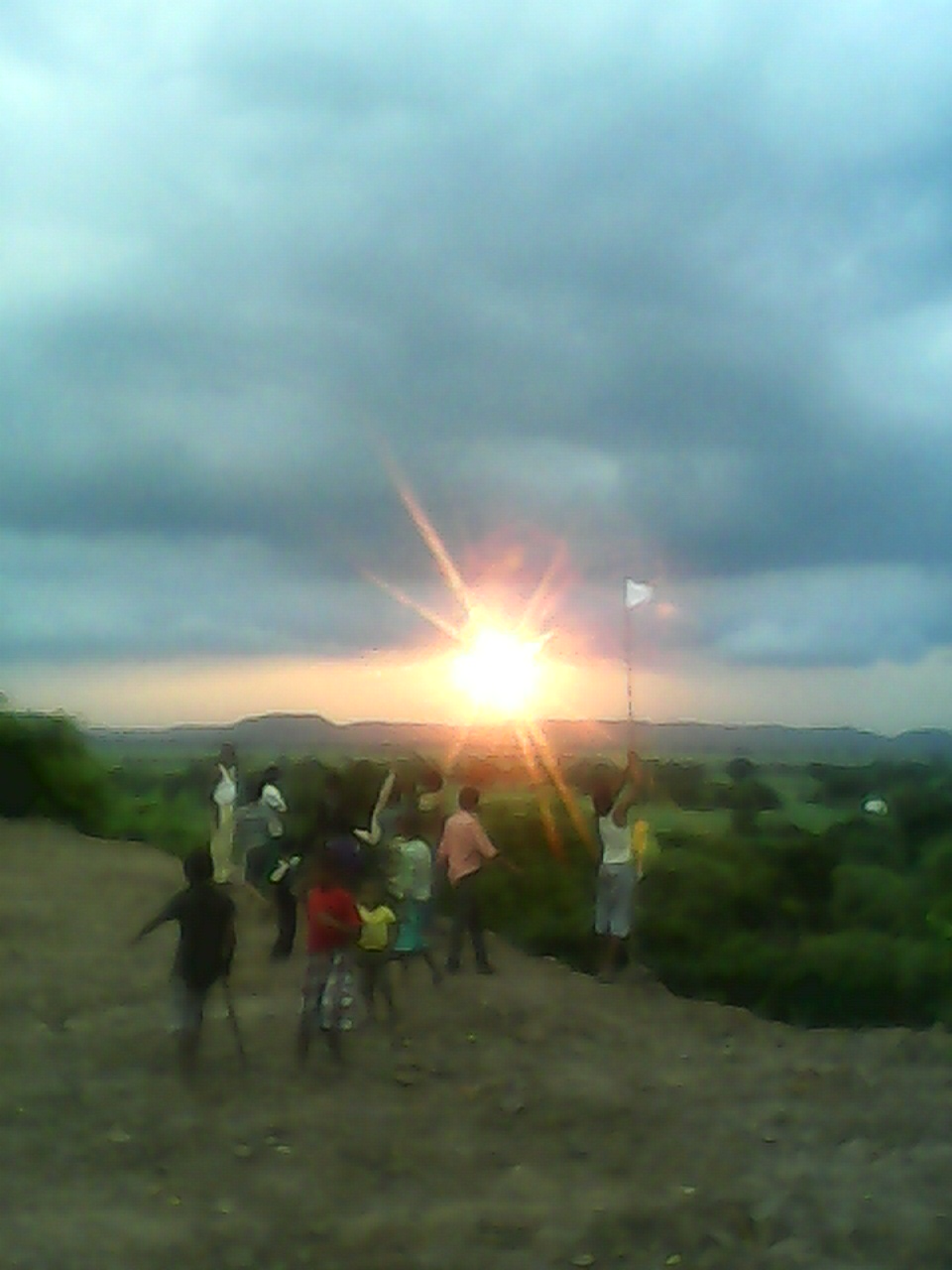 village sonhar, baba sonpal ki jai